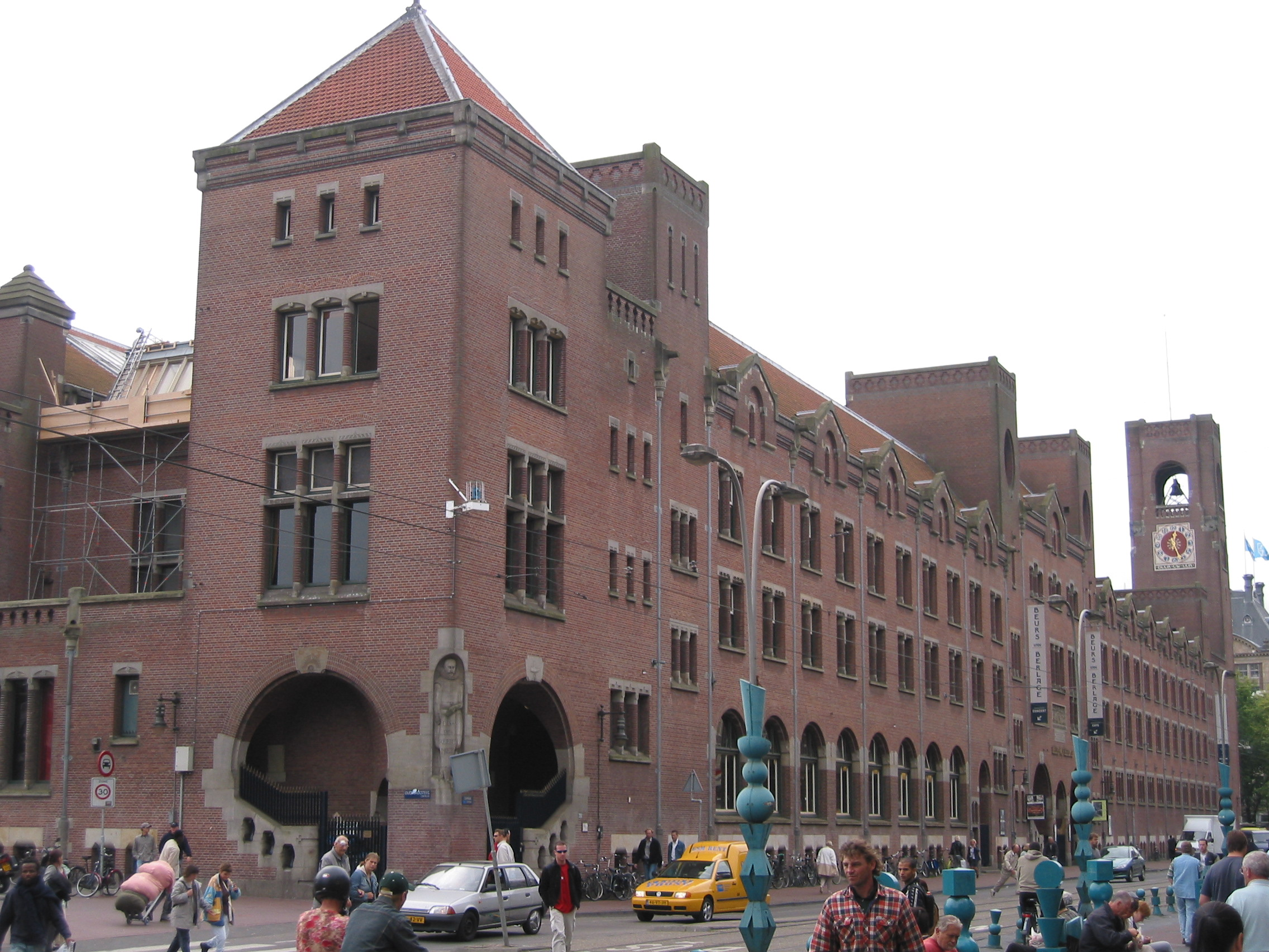 Amsterdam